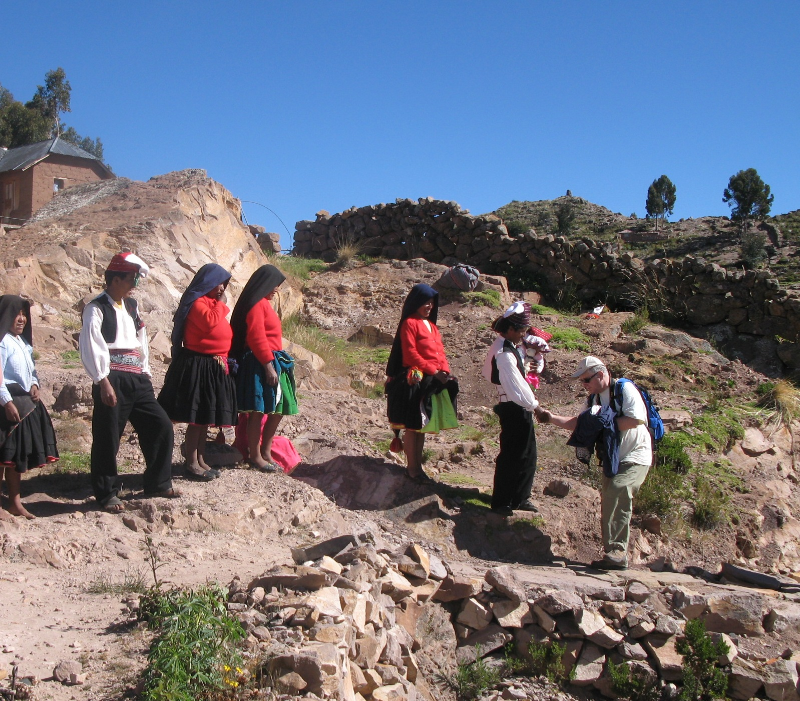 Prebivalci otoka Taquile v značilnih nošah